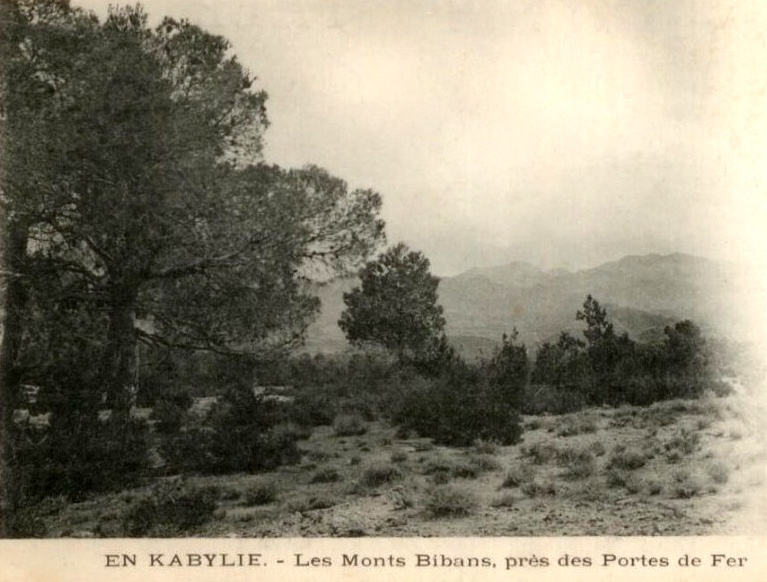 Kabylie. Monts Bibans, près des Portes de Fer, vers 1905